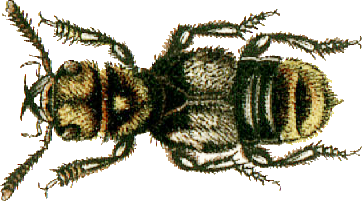 This file has been extracted from another file: Jacobs14.jpg